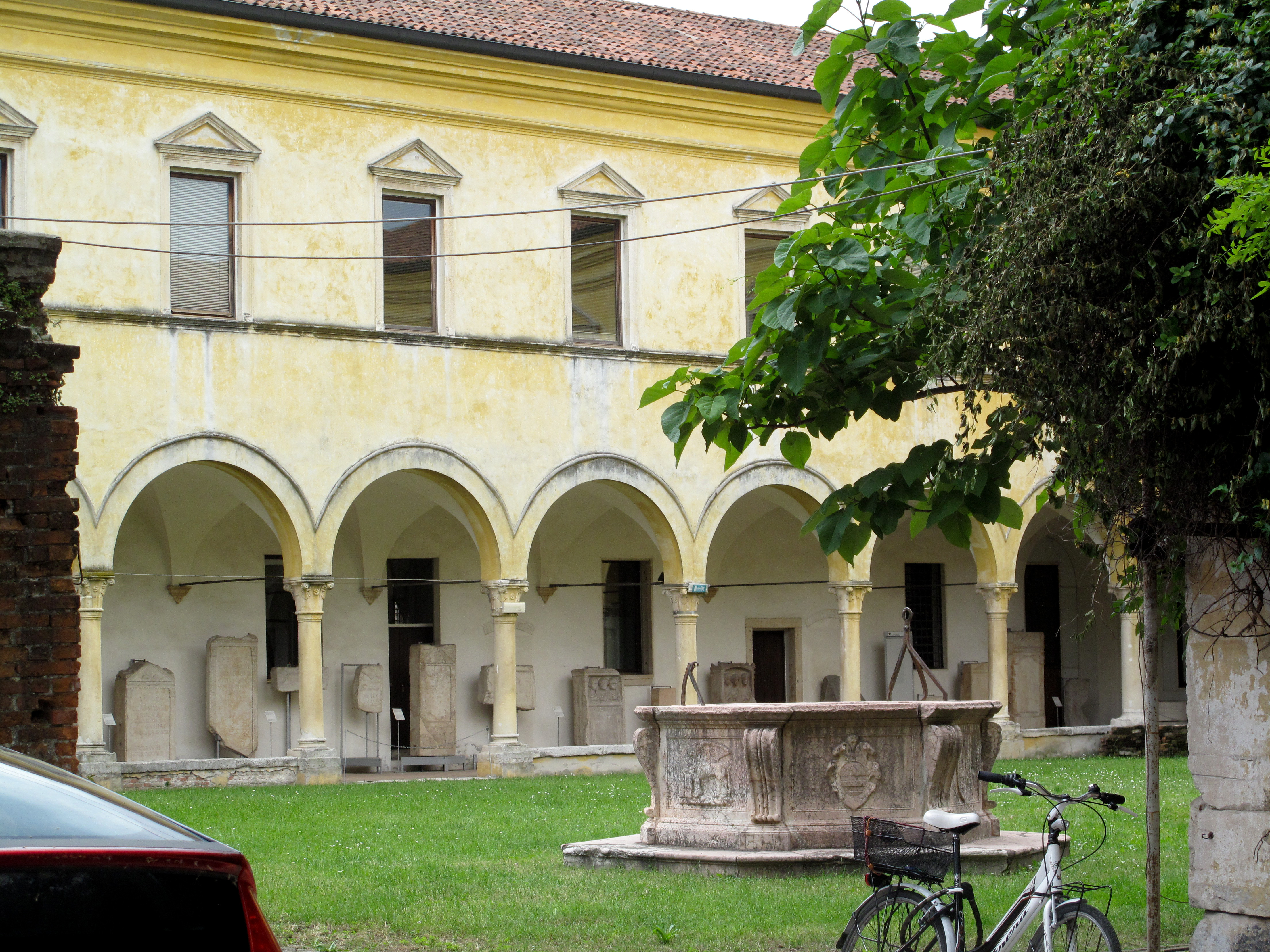 Vicenza - Chiesa di Santa Corona - Chiostro del convento